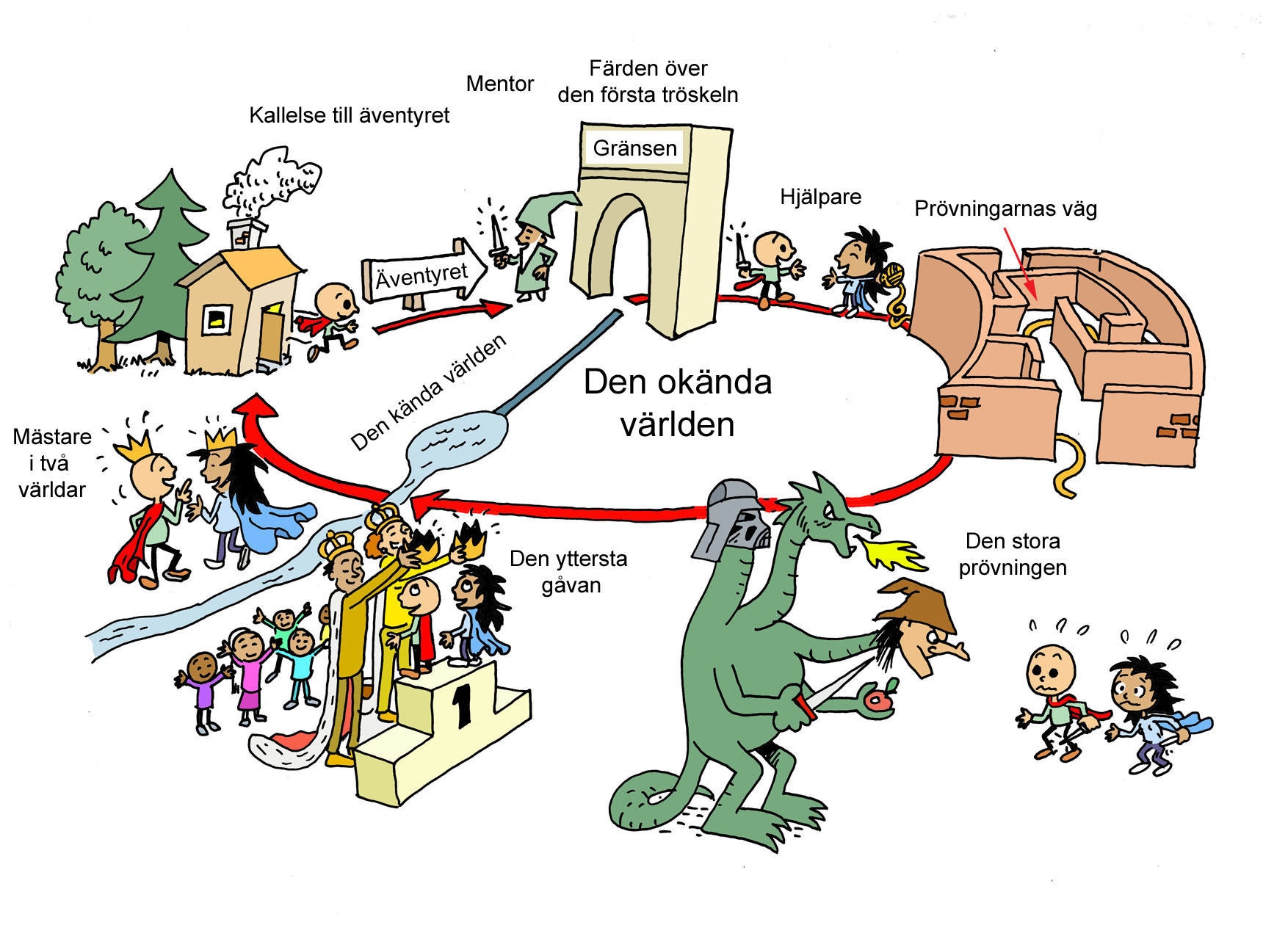 En illustration över de olika momenten på äventyret, som löst och förenklat bygger på Joseph Campbells hjälteresan.